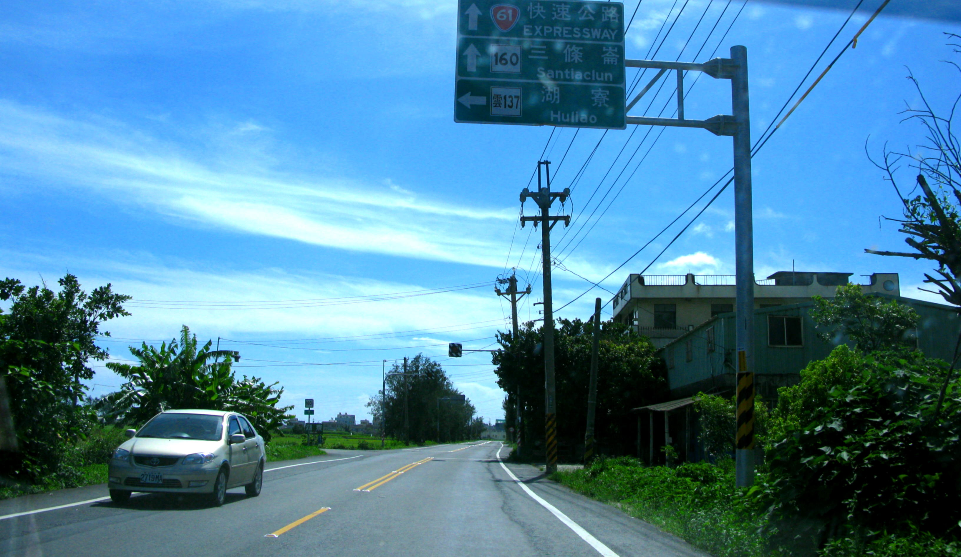 臺灣省縣道160號。